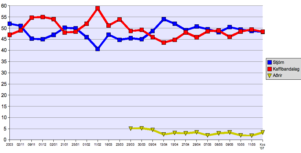 Graf sem byggir á sömu könnunum og is::Mynd:X2007_kannanir.PNG en hér er lagt saman fylgi núverandi stjórnarflokka (B+D) annarsvegar og kaffibandalagsins svokallaða (F+S+V) hinsvegar. --Bjarki 21:37, 7 maí 2007 (UTC)